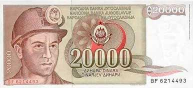 20000 Yugoslav dinars note (1987)